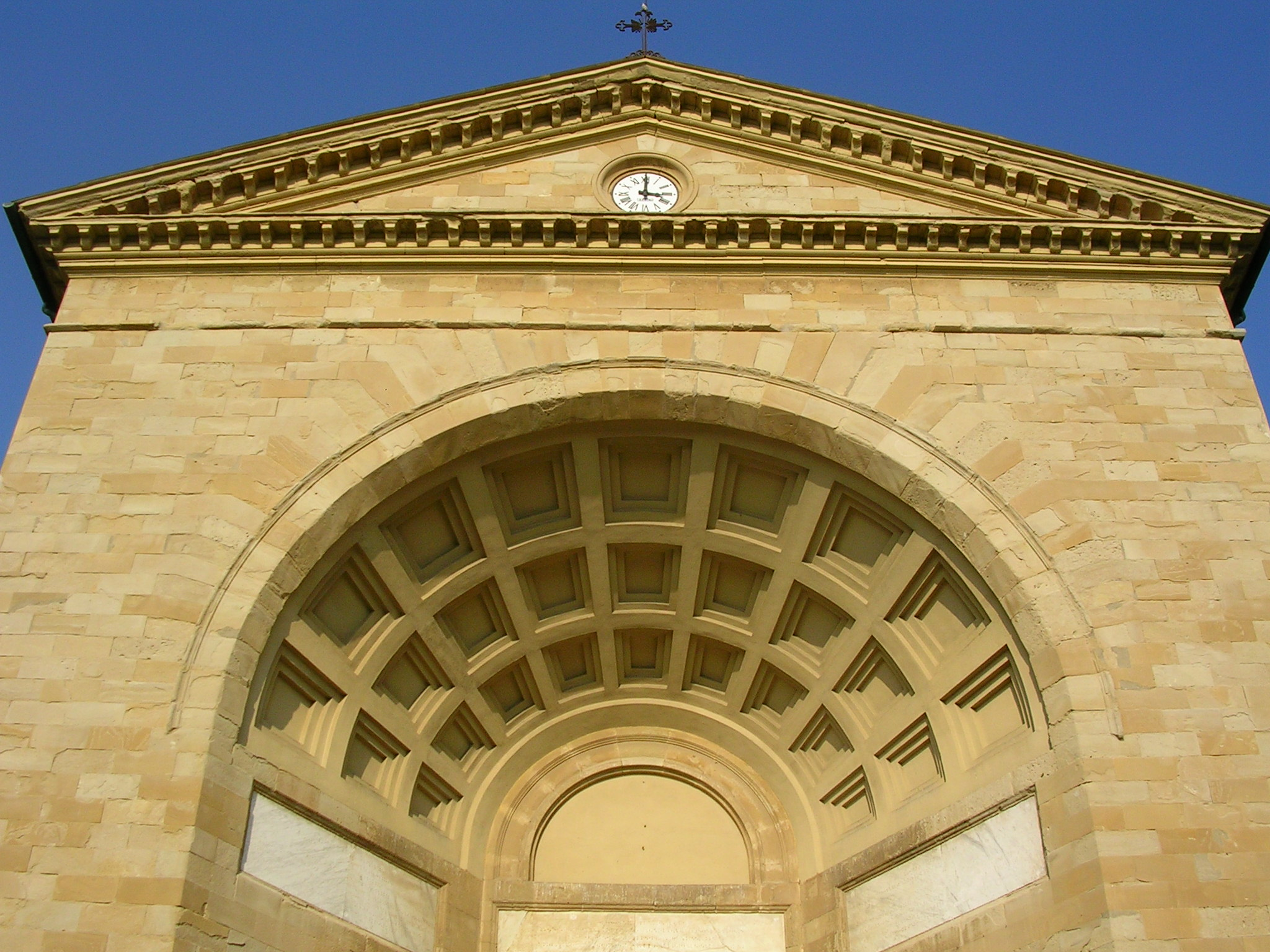 Livorno: la chiesa di San Giuseppe (XIX secolo). Particolare della facciata.